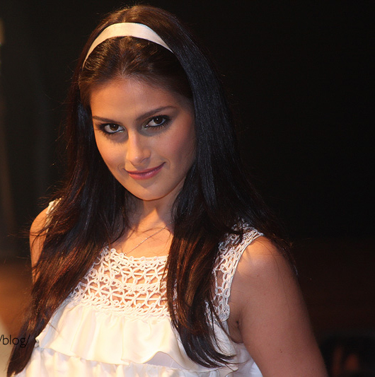 Natália Guimarães na SLZ Fashion.